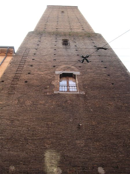 Torre degli Azzoguidi in Bologna. Picture by Paolo Carboni (myself)